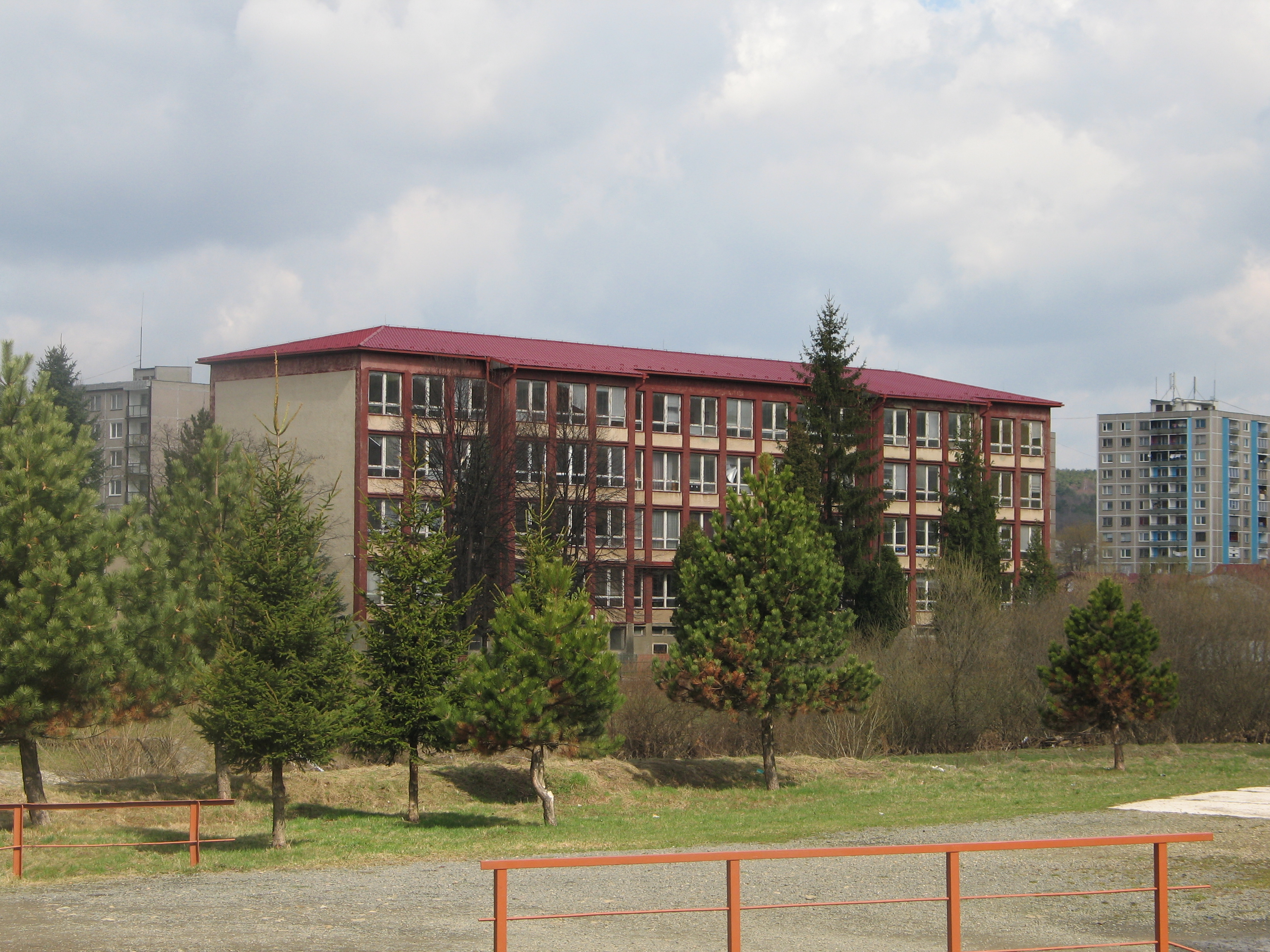 Školská budova bola postavená začiatkom 60. rokov 20. storočia